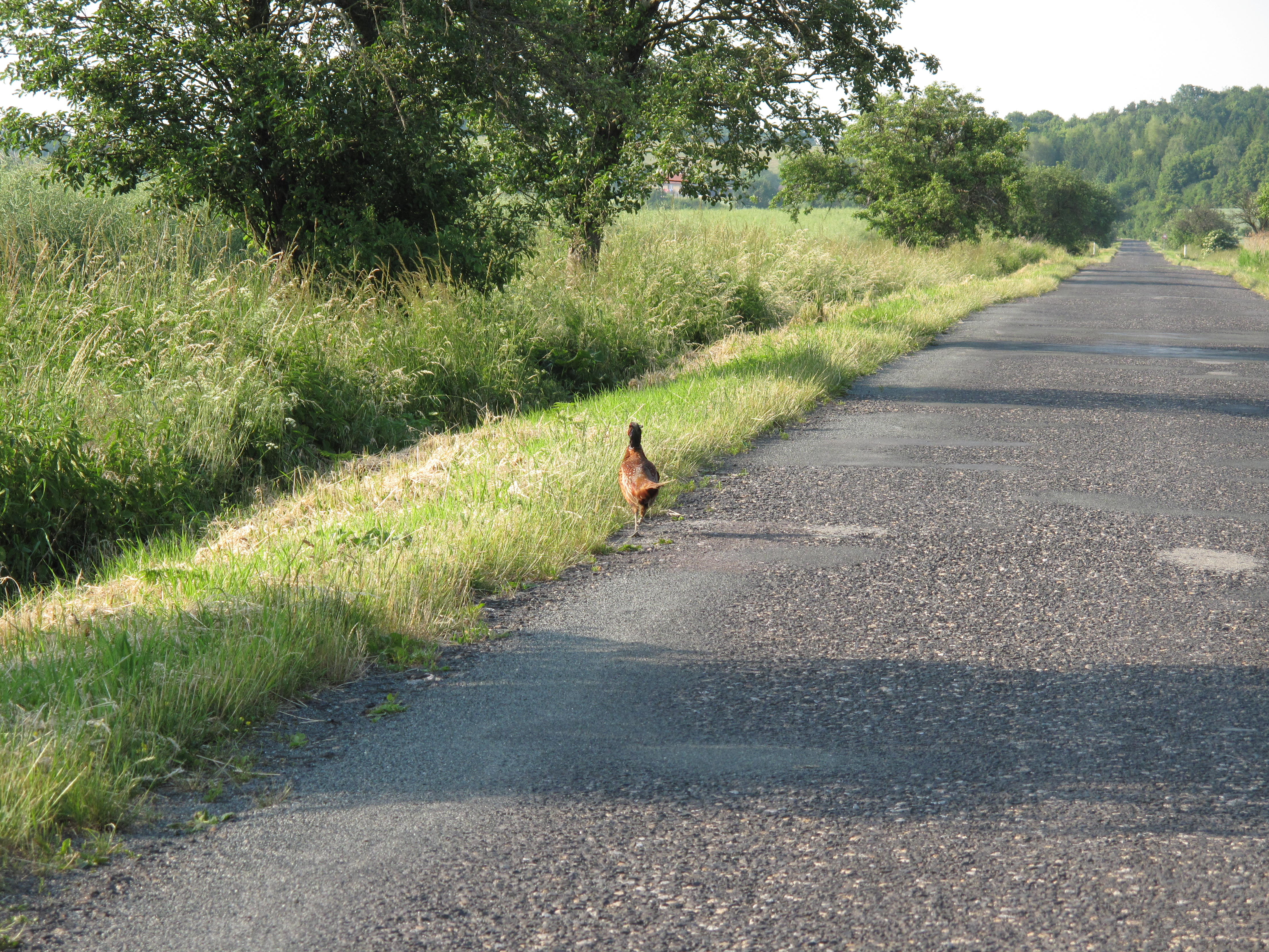 Bažant v ptačí oblasti Rožďalovických rybníků. Česká republika.